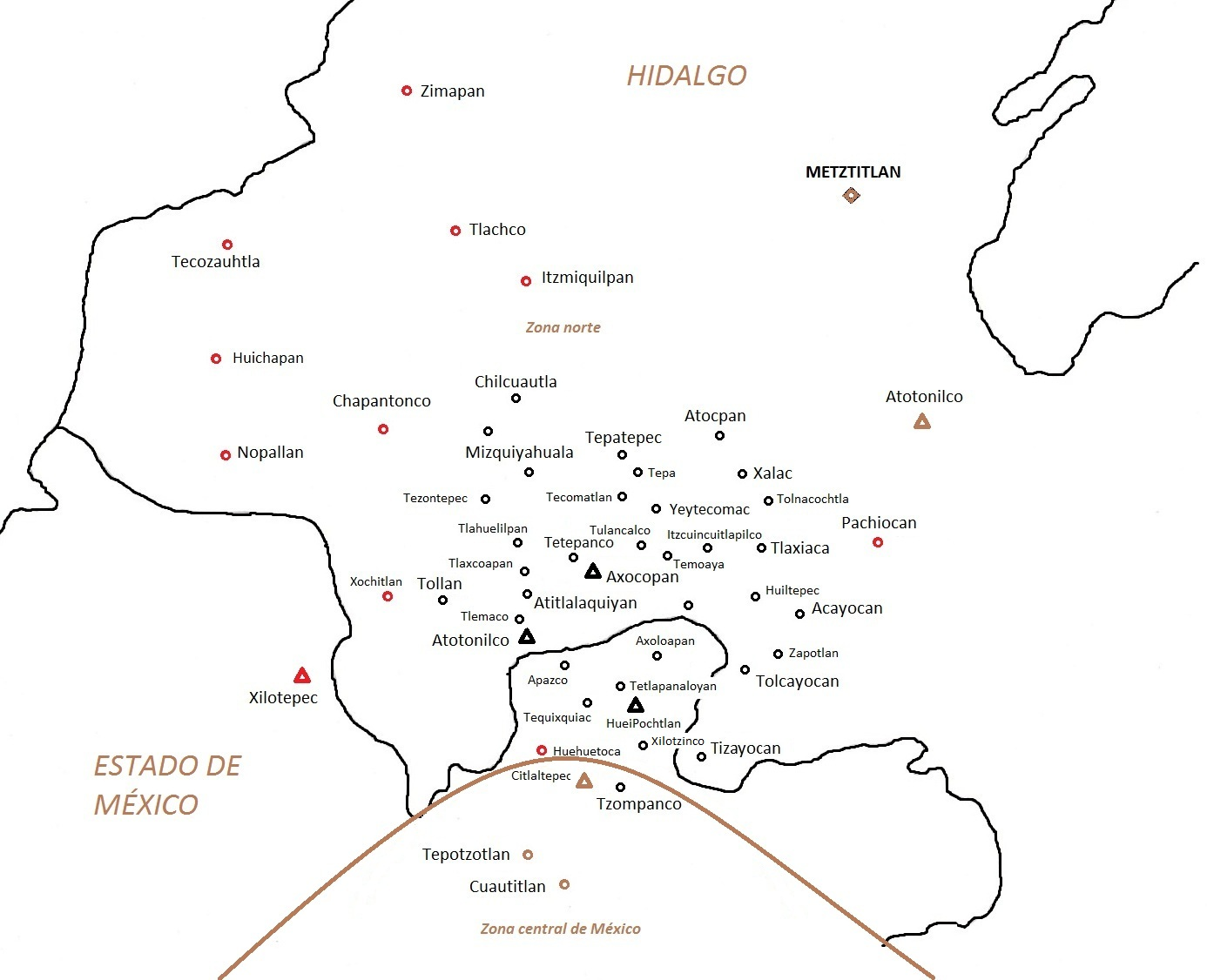 Principales poblaciones al norte del Valle de México en la época prehispánica. Con triángulos se representan las cabeceras de las provincias tributarias, con círculos los dependientes; Metztitlan (con rombo) era un señorío independiente de la Excan Tlahtoloyan. Se hace la diferenciación con color; en negro las poblaciones que Sherburne Cook considera pertenecen a Teotlalpan (por espacio se pusieron solo 37 de 42), en rojo poblaciones consideradas por otros autores, en café poblaciones consideradas fuera de la región.